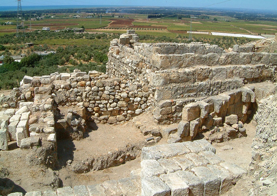 Fortezza di Arqa (Libano) Licensing Categoria:Libano